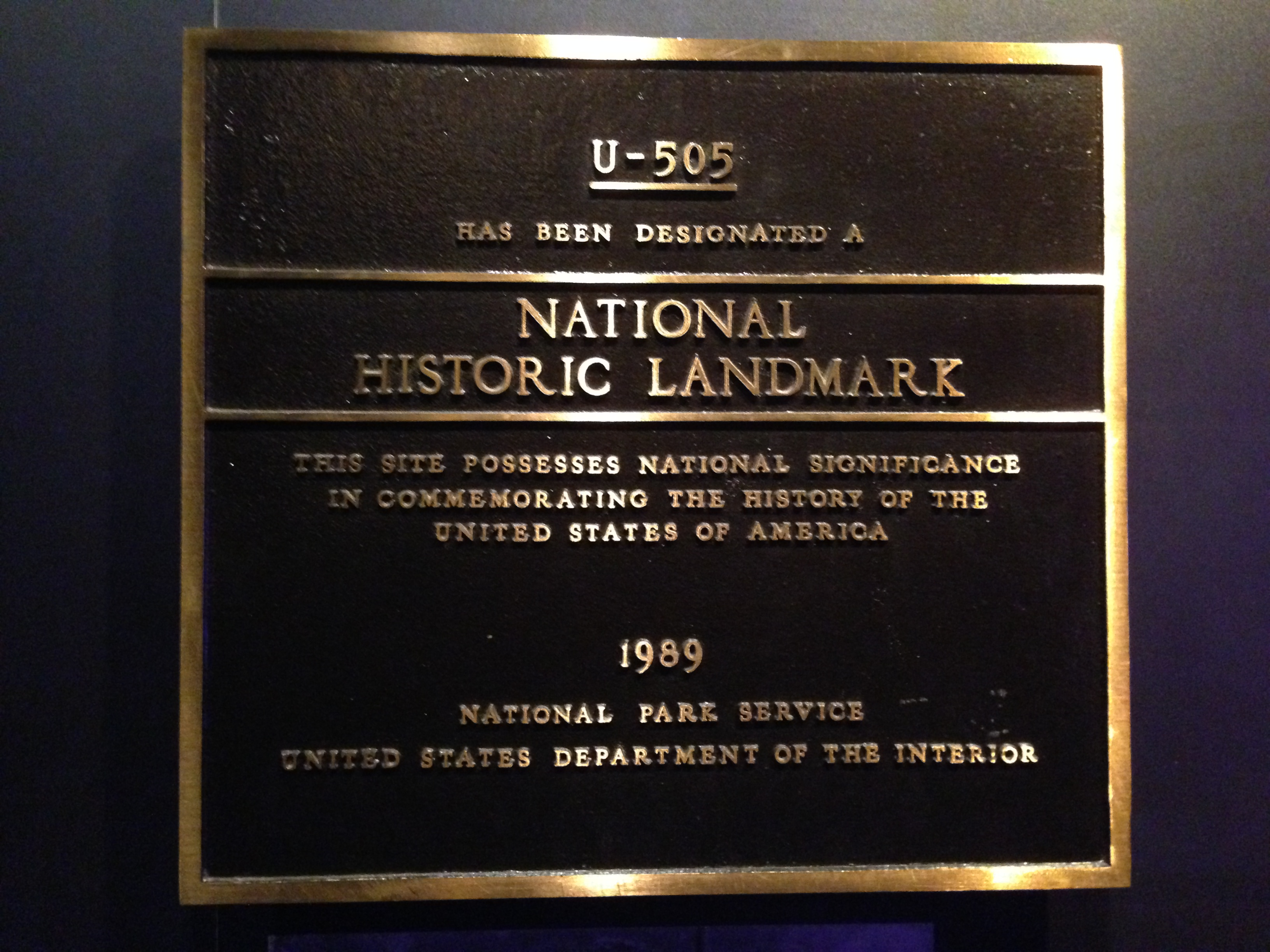 U505 marker